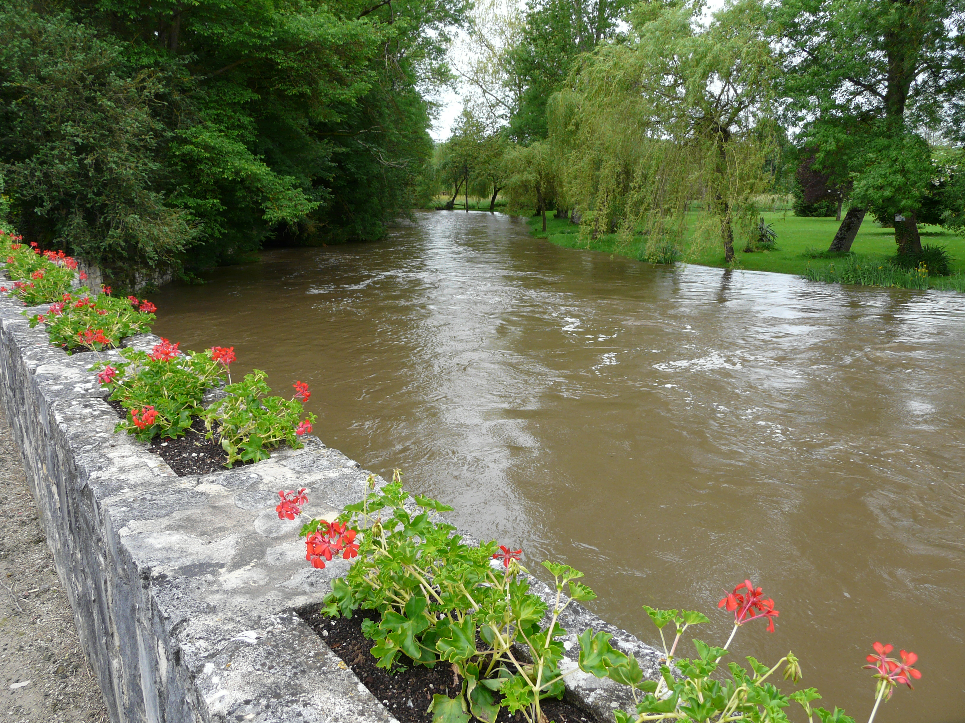 Rivière le Bandiat en aval du pont de la route départementale 4, Feuillade, Charente, France